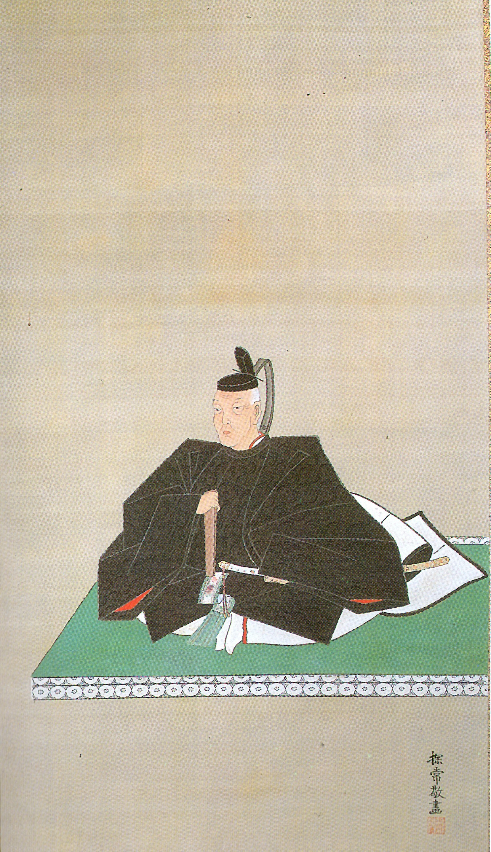 松平正容の肖像。